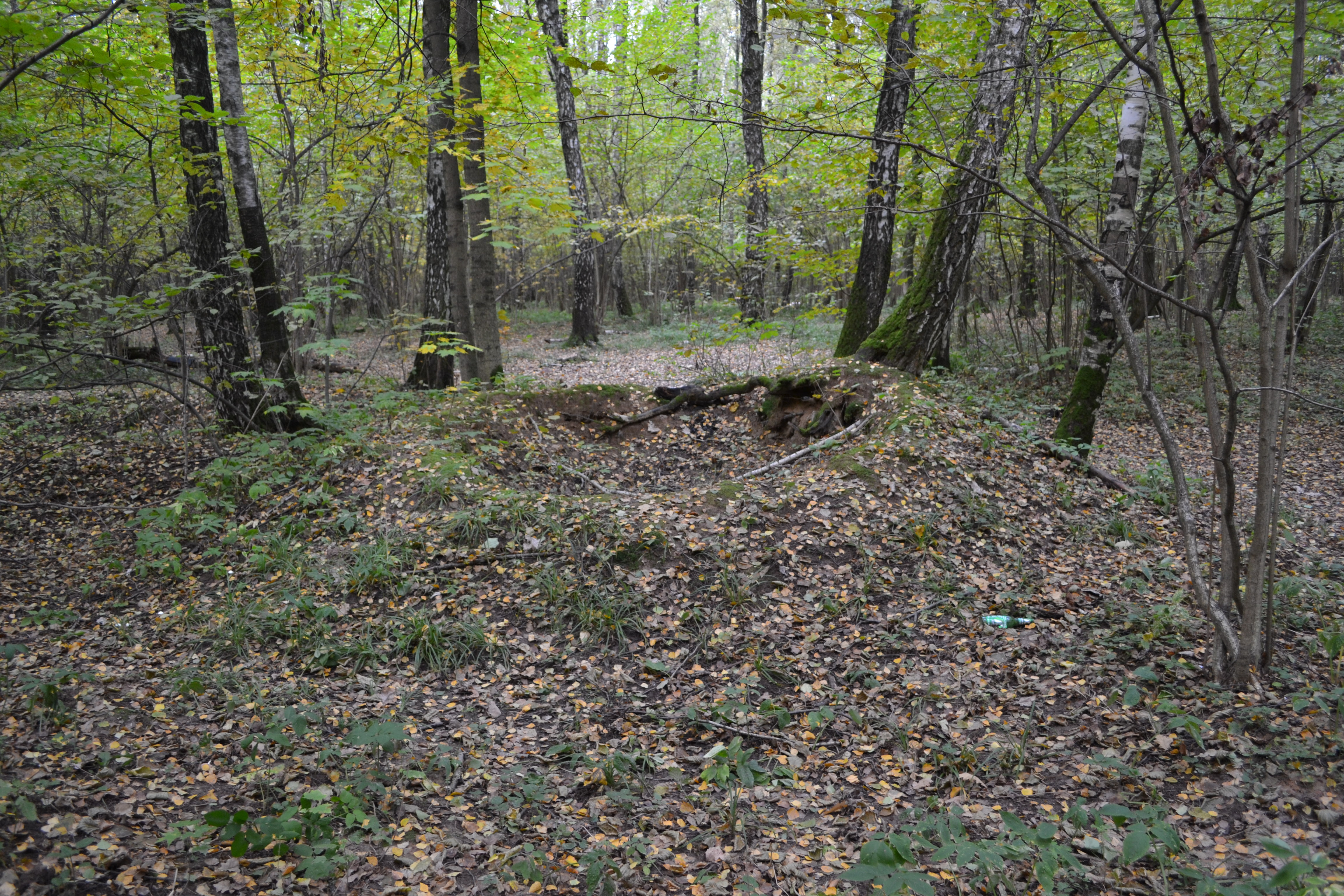 1-й Коньковский курганный могильник: ландшафтный заказник Тёплый Стан, Юго-Западный округ, Москва